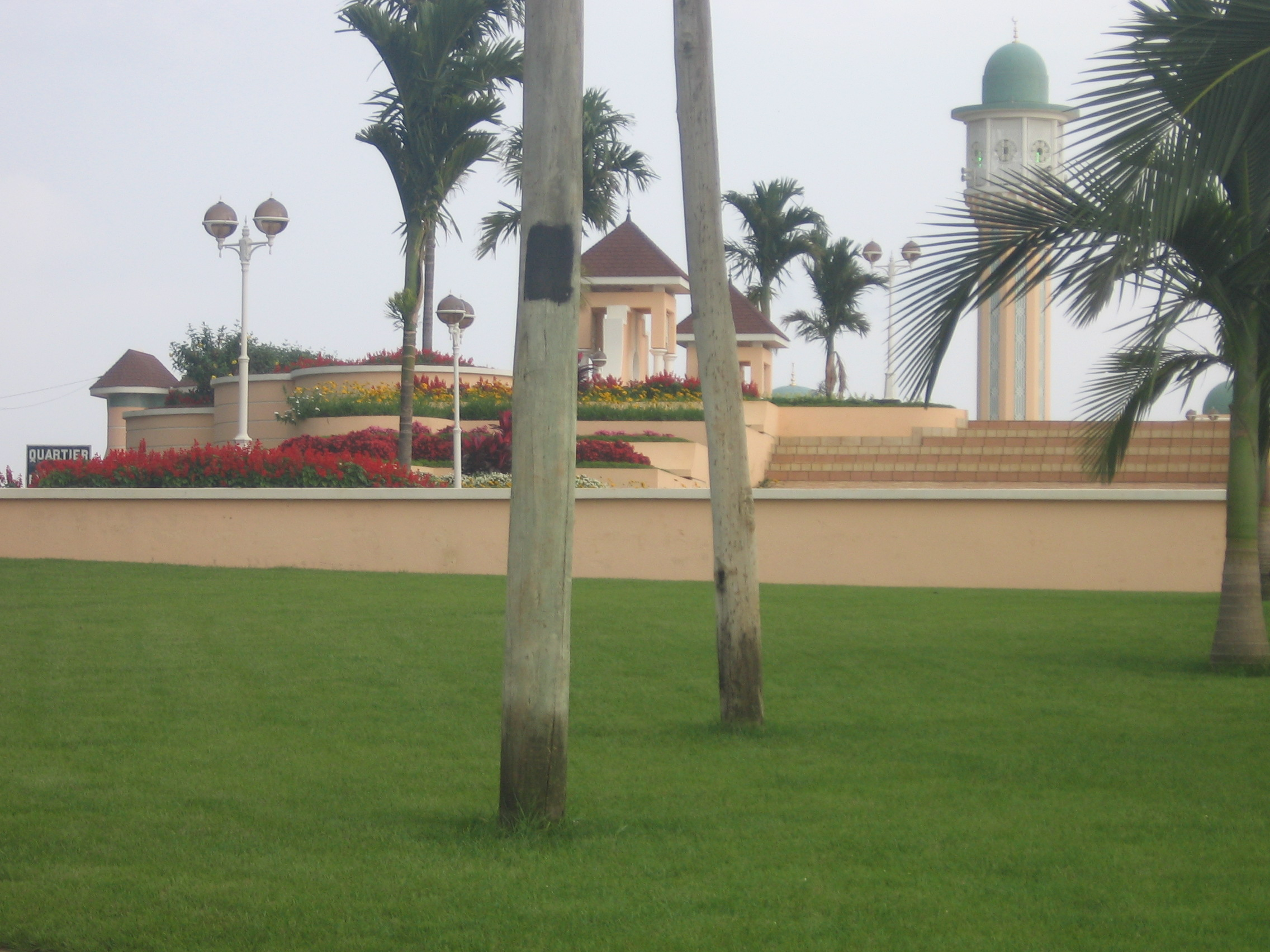 Riche quartier a Ngaoundere (Quartier haut plateau)